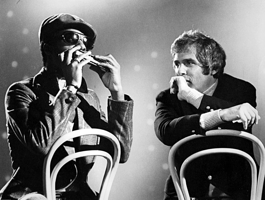 Jam session photo with Stevie Wonder and Burt Bacharach.